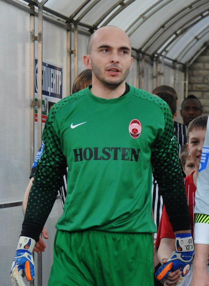 Дмитрий Козаченко